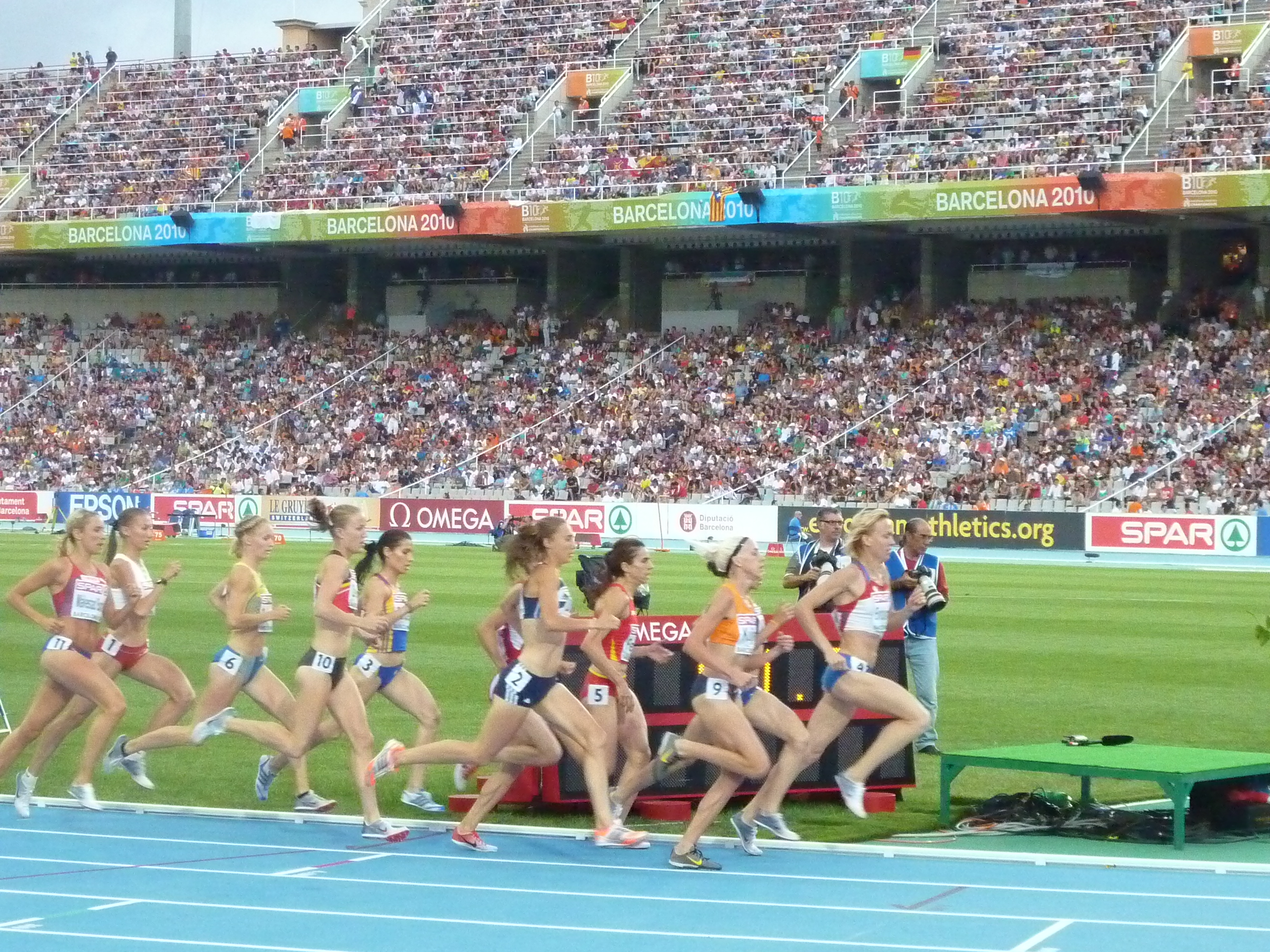 1500m semifinal